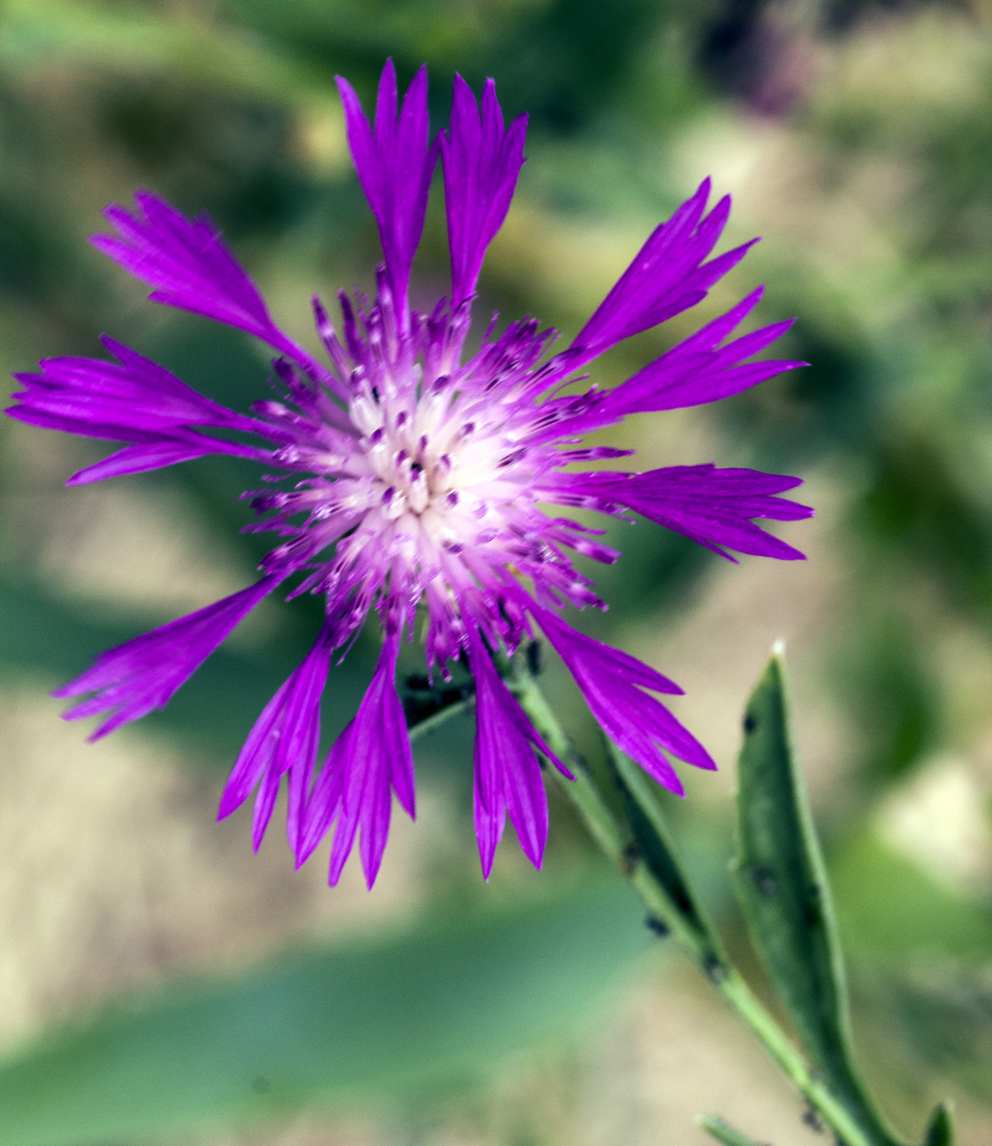 Centaurea diluta. Cerro del Humo (37.548916,-4.640892). Montilla (Córdoba). 09-VI-2013